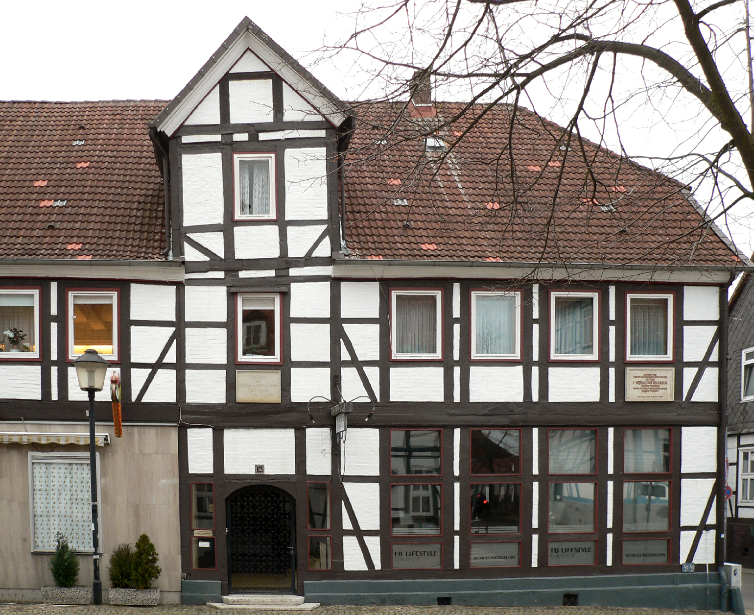 Vorsfelde, Langestrasse 36, Gretehaus